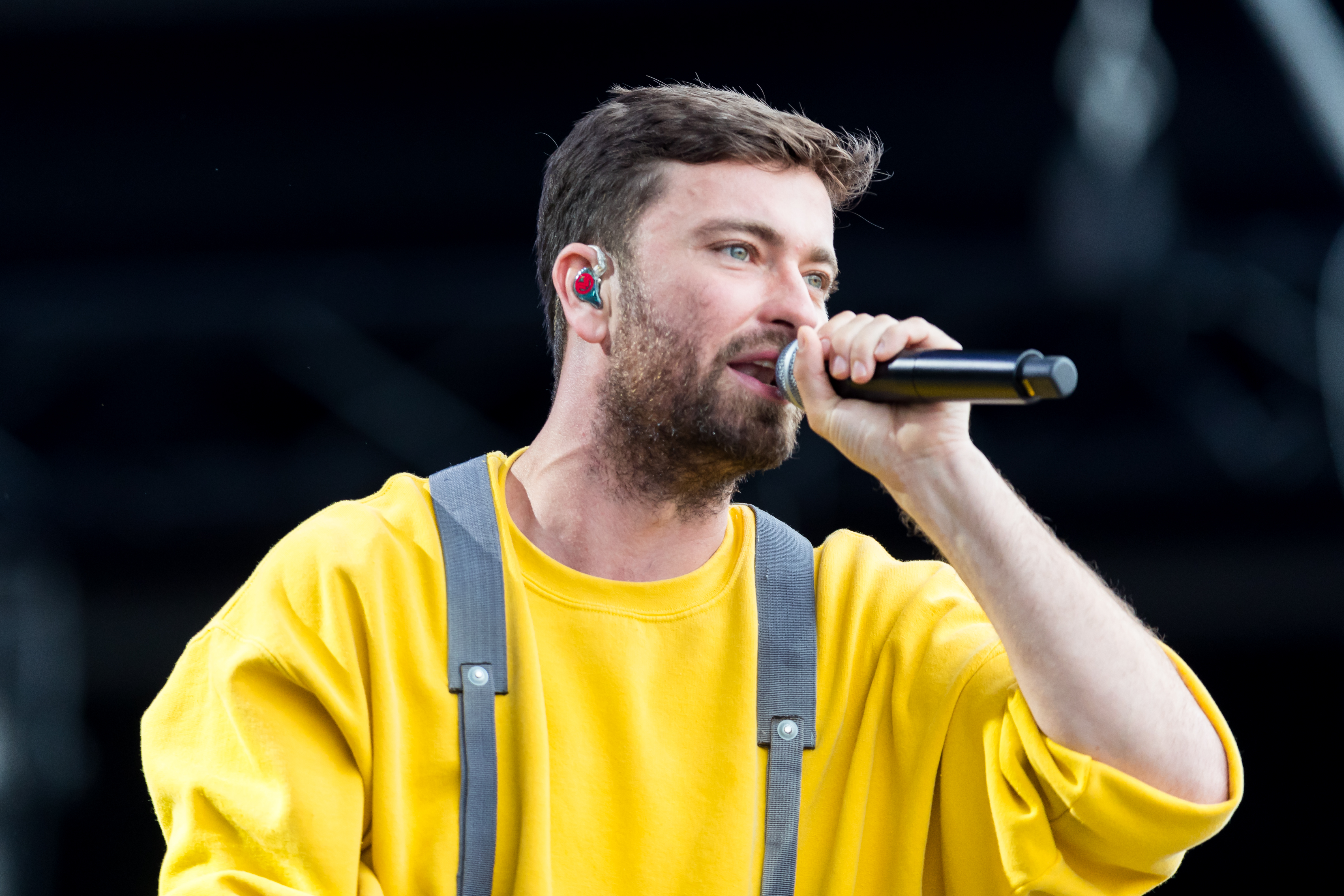 Marteria during Rock am Ring at Nürburgring, Nürburg, Rheinland Pfalz, Germany on 2017-06-04, Photo: Sven Mandel